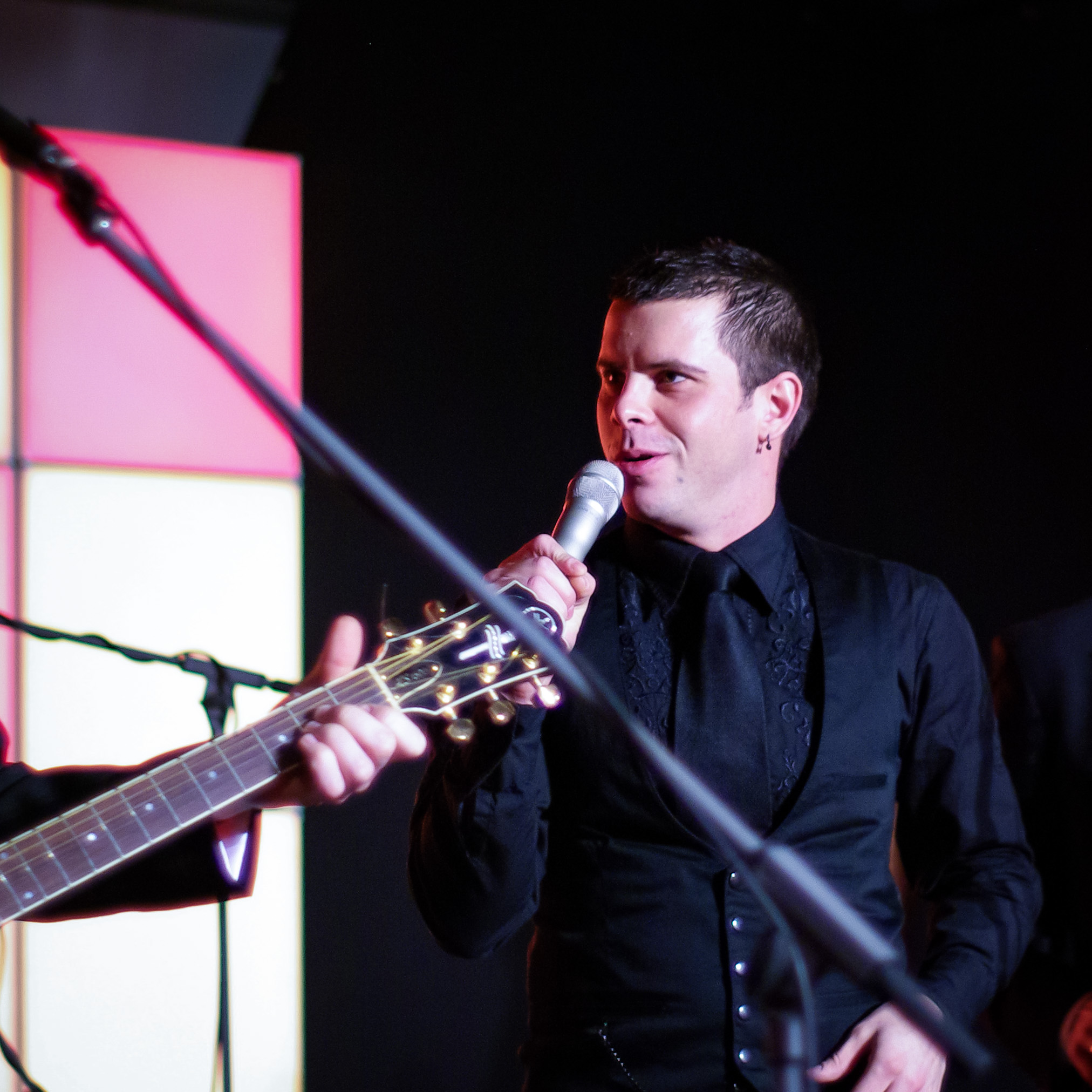 Latviešu dziedātājs, Talsu diksilenda orķestra, sava "Abonementa orķestra" un daudzu citu muzikālo projektu dalībnieks, solomākslinieks - Intars Busulis